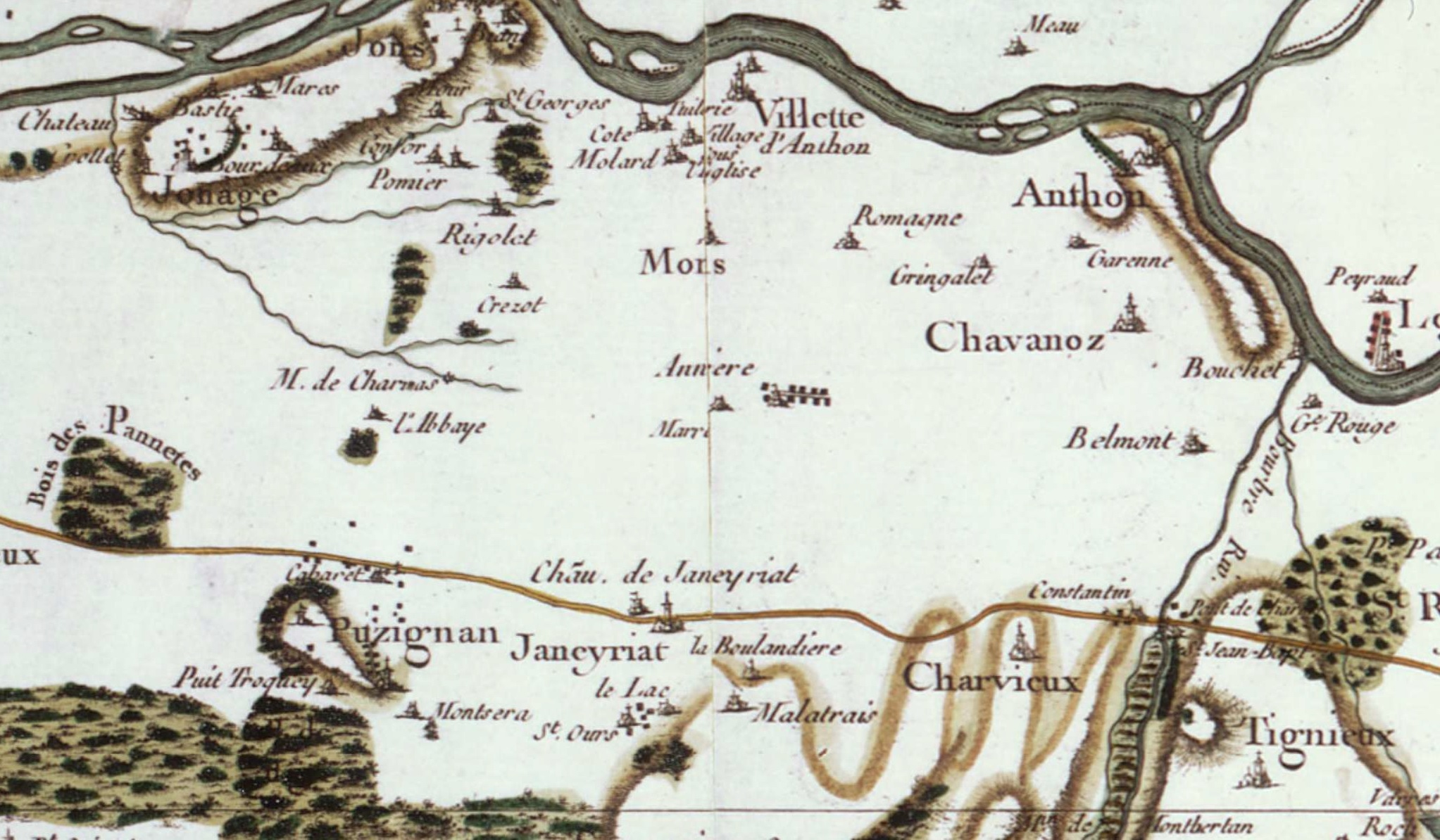 Carte de Cassini, sélection Janneyrias.